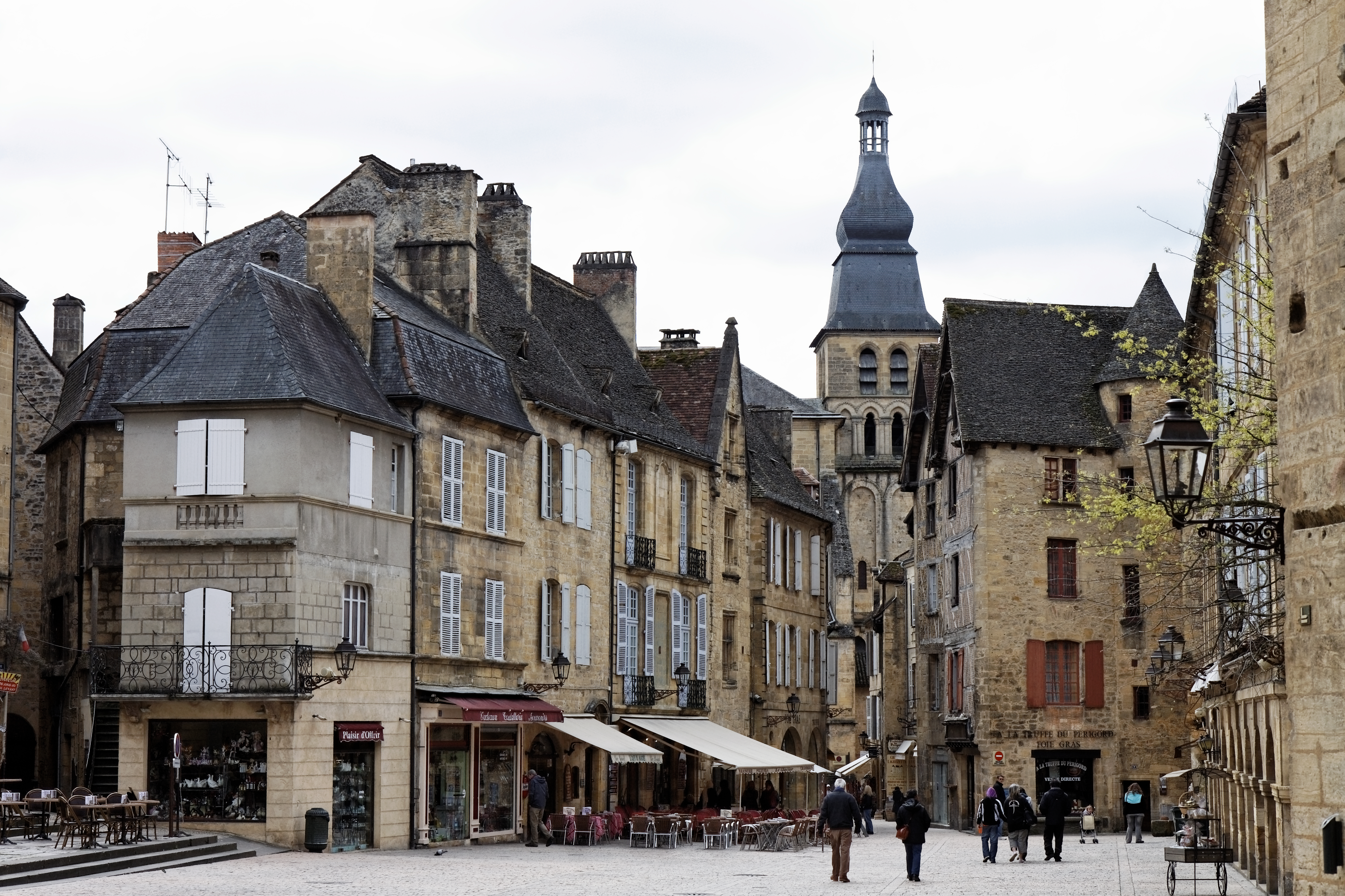 Vue de l'ancienne cathédrale Saint-Sacerdos de Sarlat.